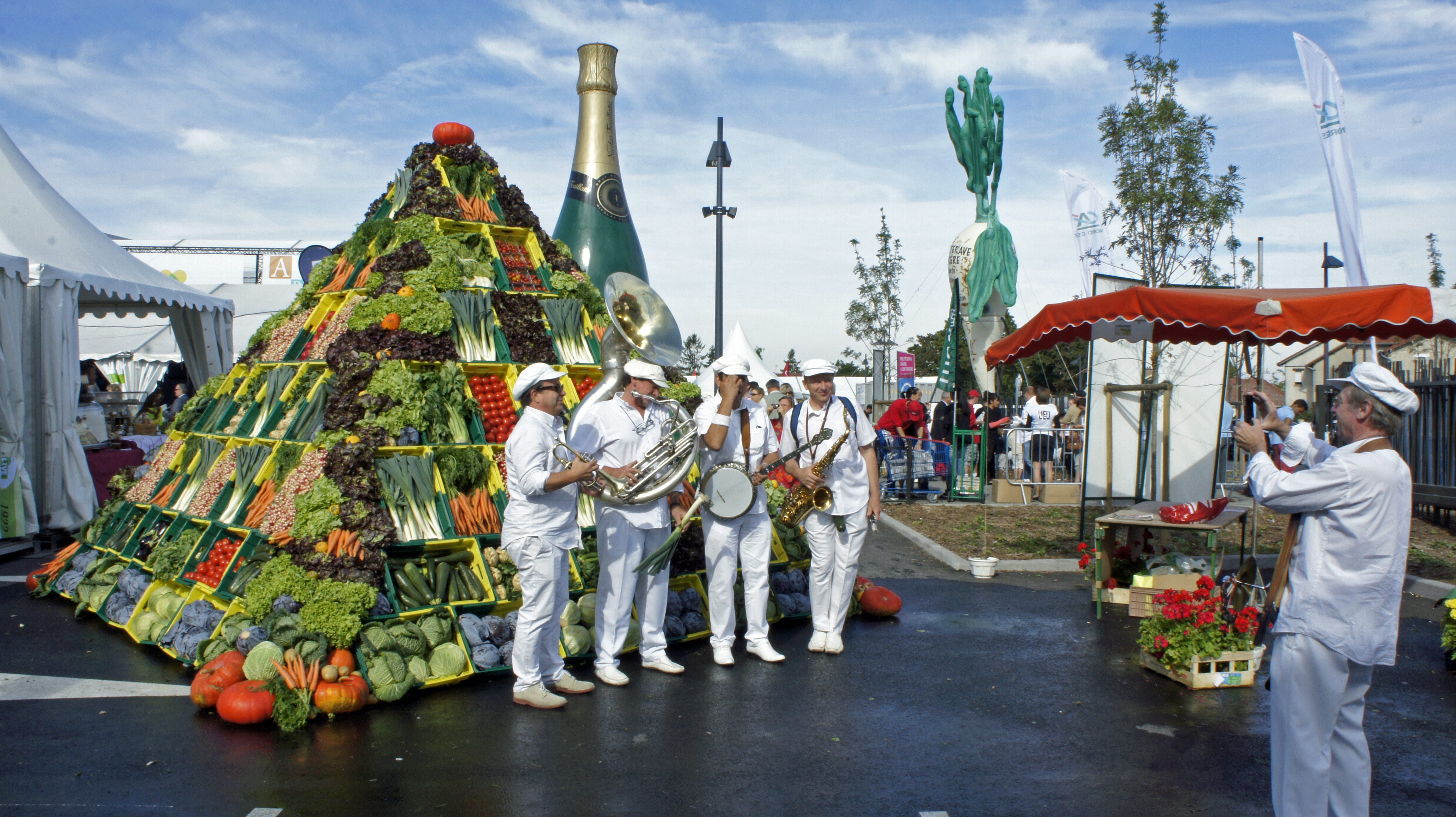 Entrée de la Foire de Châlons de 2012.